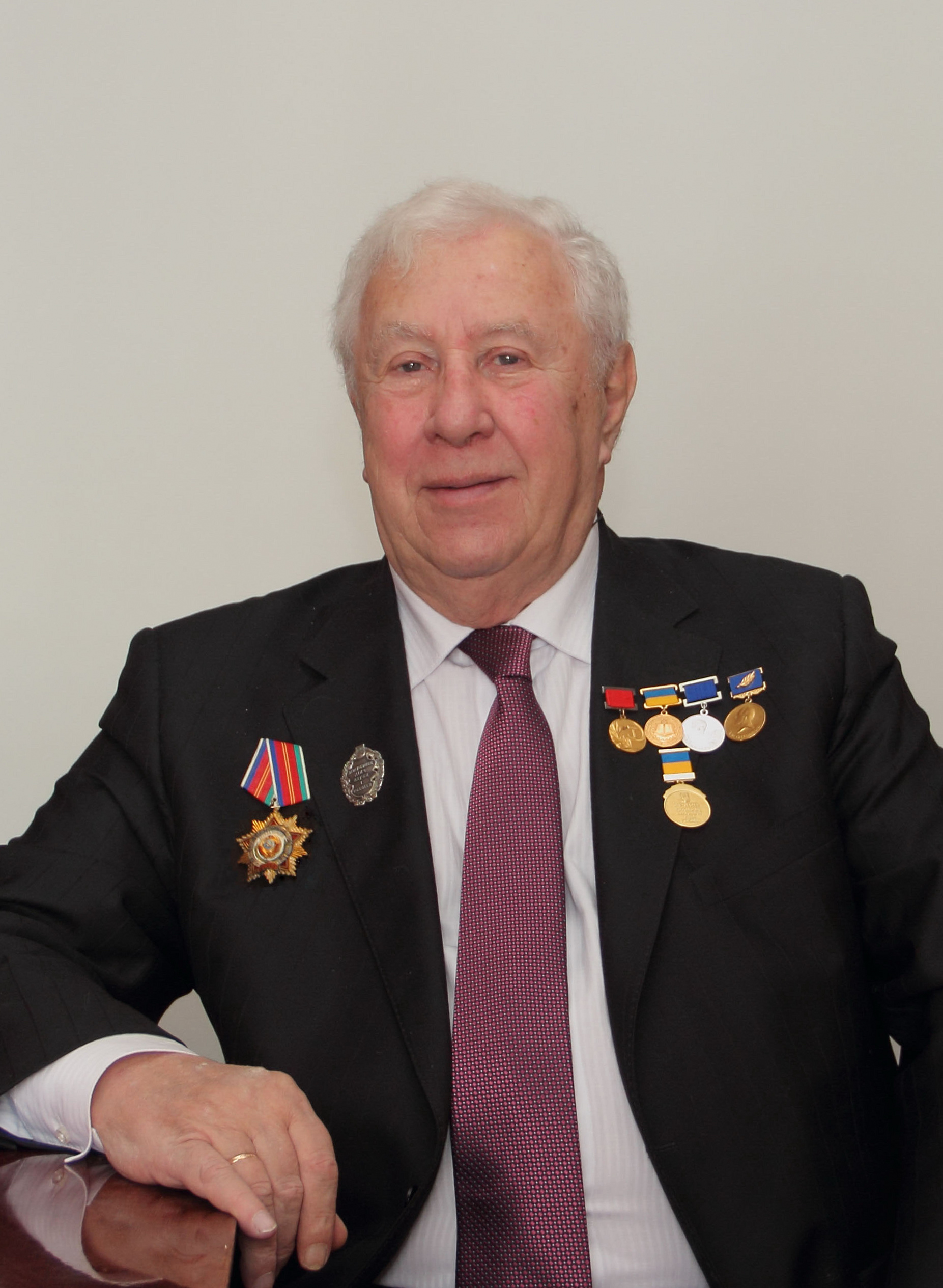 Ілля Аронович Ліхтарьов (1935 - 2017)